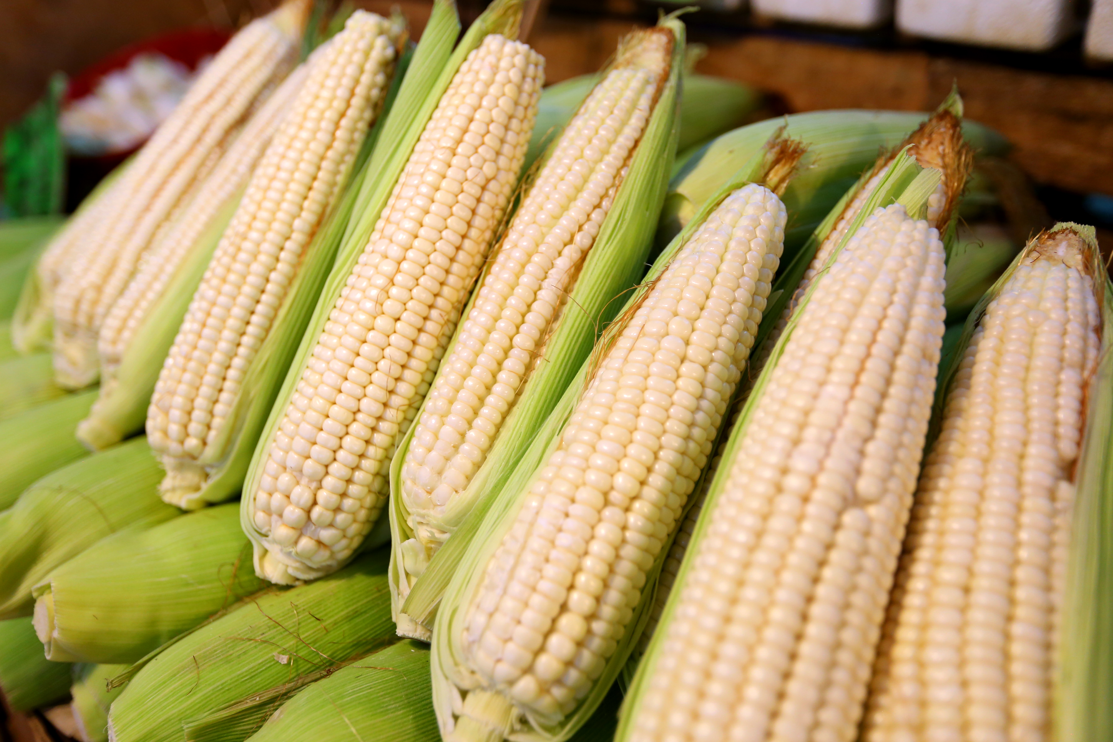 Central de Abastos CDMX